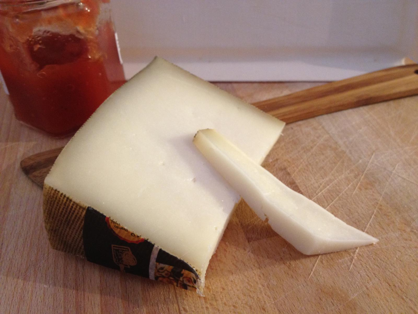 Queso Chillón curado, un queso de oveja con leche cruda elaborado en Toro (Zamora, España). Contenido del envío del Club del Queso Mumumío de septiembre.